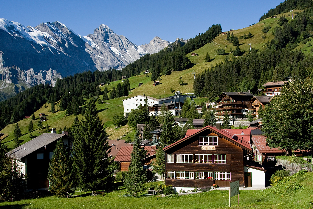 Mitten in Mürren mit Blick westwärts zum Gspaltenhorn